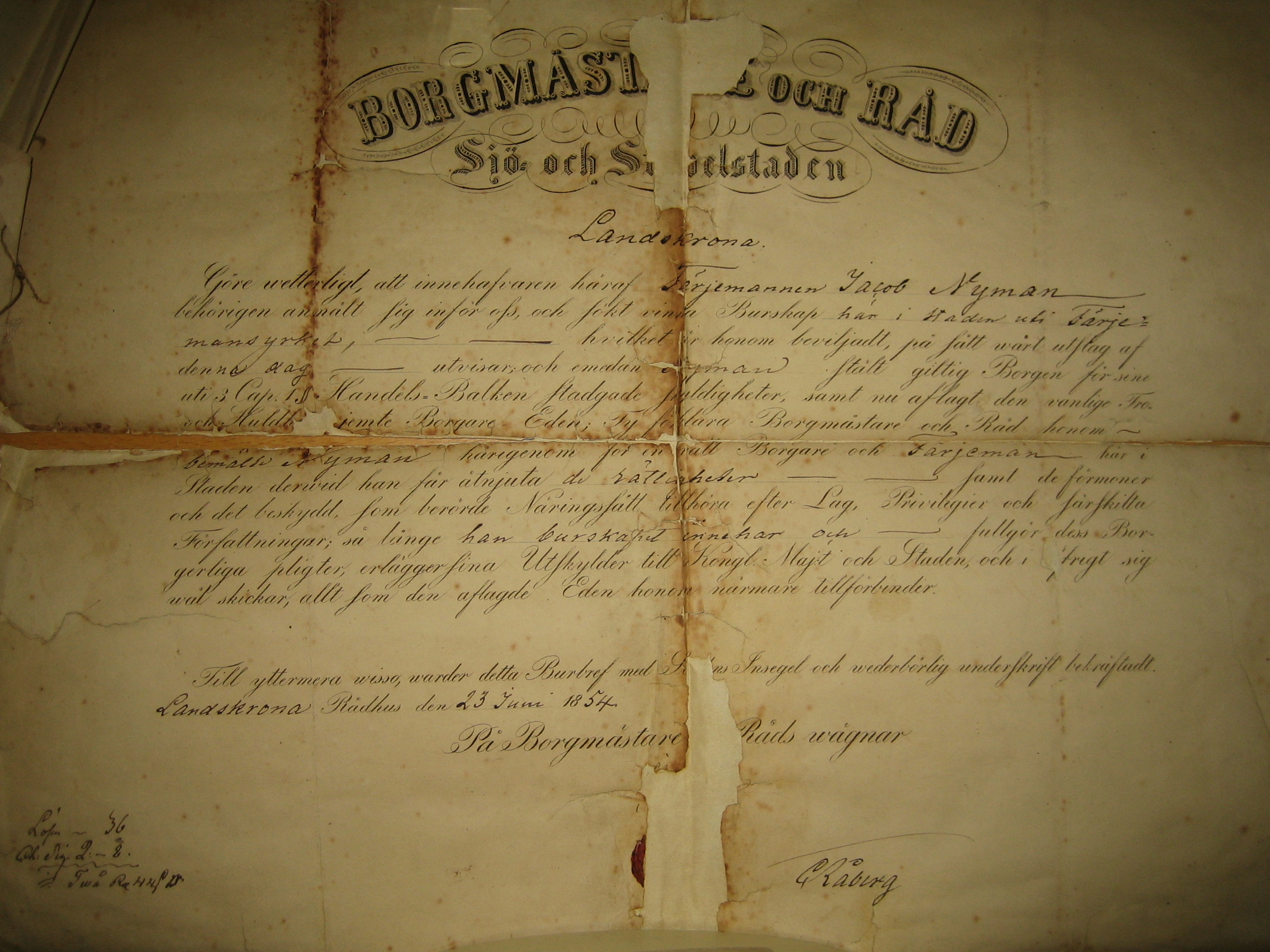 Burbrev utfärdat 1854 av magistraten i Landskrona för färjemannen Jacob Nyman. Originalet finns på Landskrona Museum.